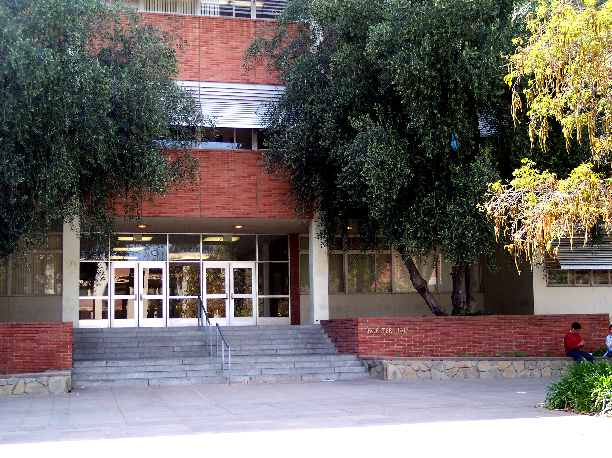 Boelter Hall, UCLA